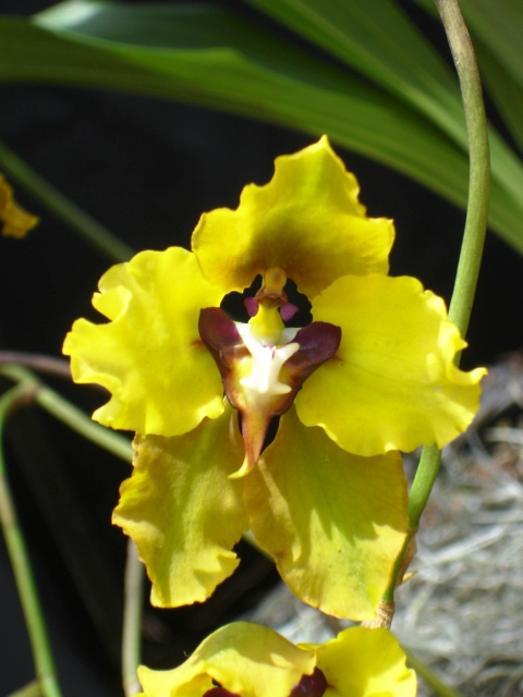 Cyrtochilum macranthum - Orquidea: Jardin botanico Jóse Jose celestino Mutis (Bogota,Colombia)